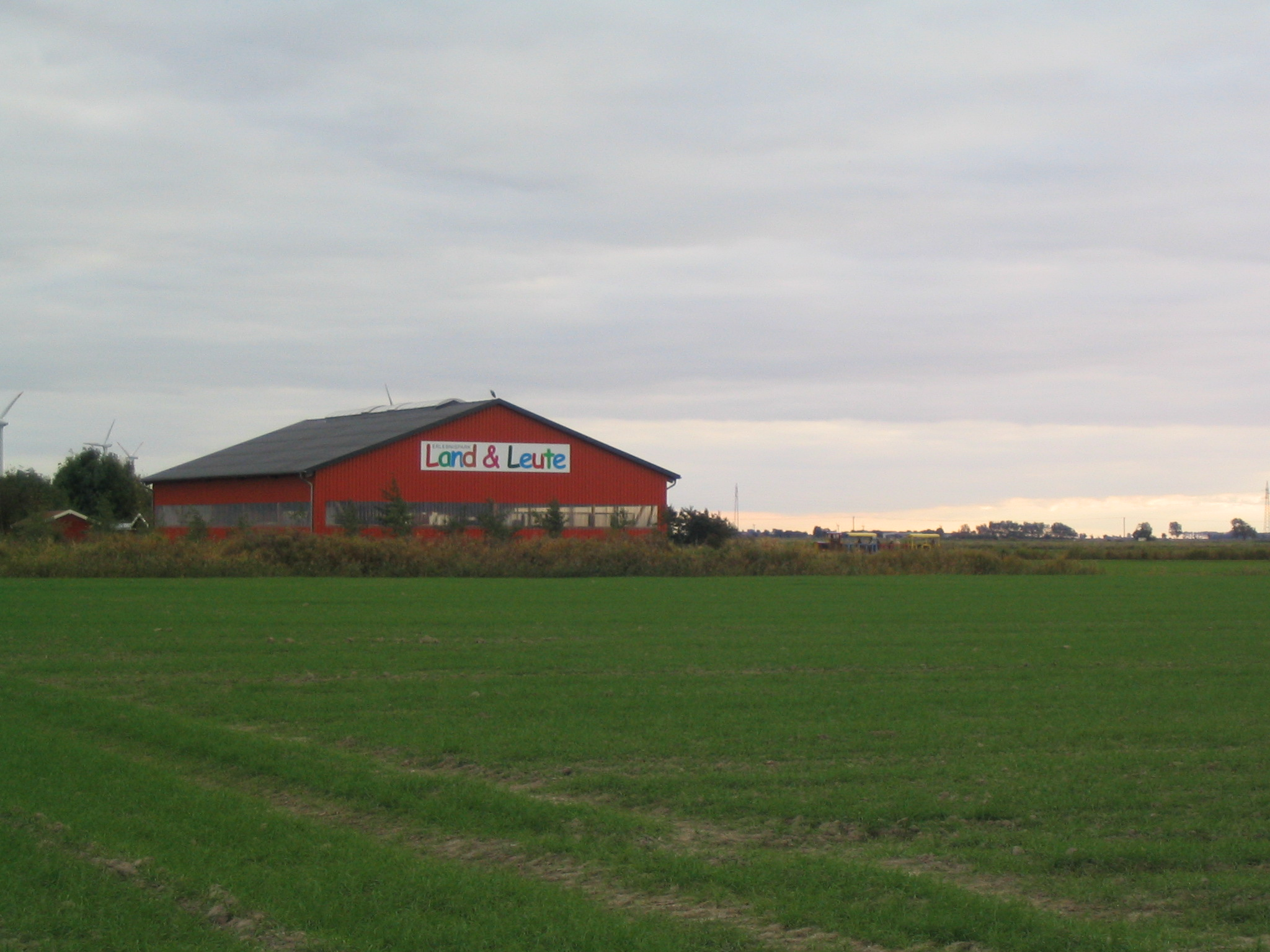 Land und Leute Freizeitpark